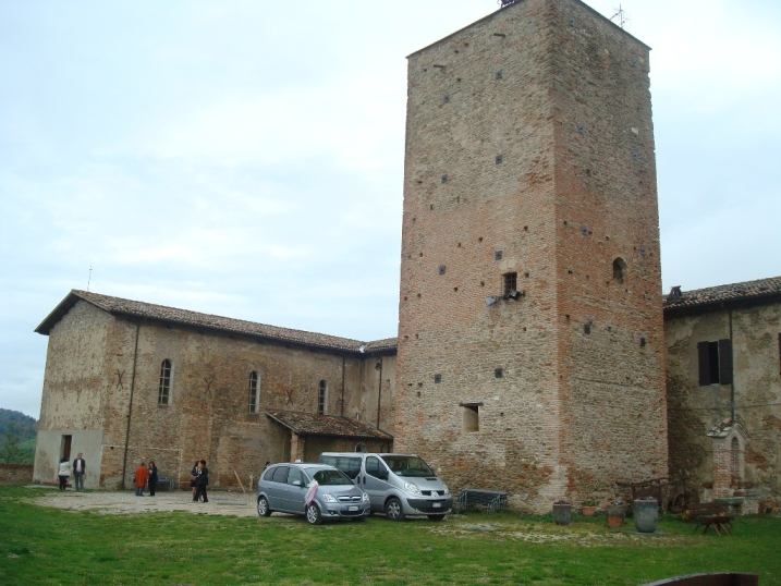 Roncofreddo (Italie)- La rocca de Sorrivoli, cour intérieure